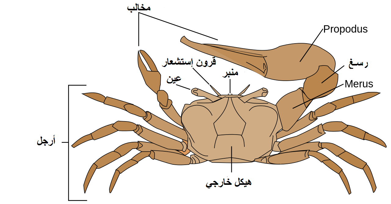 رسم بياني لتشريح السرطان عازف الكمان مترجم الى العربية ما عدا العبارات الأجنبية الغير قابلة للترجمة